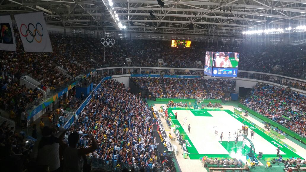 Quartas de final do Torneio Masculino de Basquete na Arena Carioca 1